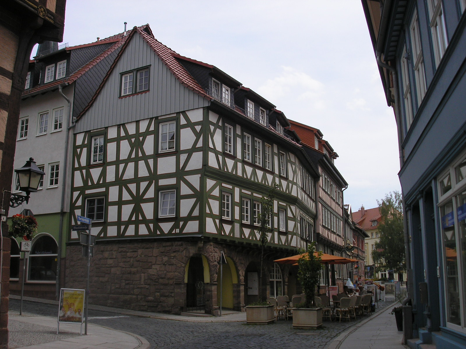 Blick durch eine Gasse in der Altstadt von Nordhausen (Thüringen).